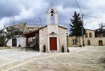 Ιερός Ναός Μεταμορφώσεως Σωτήρος Πασαλιτών